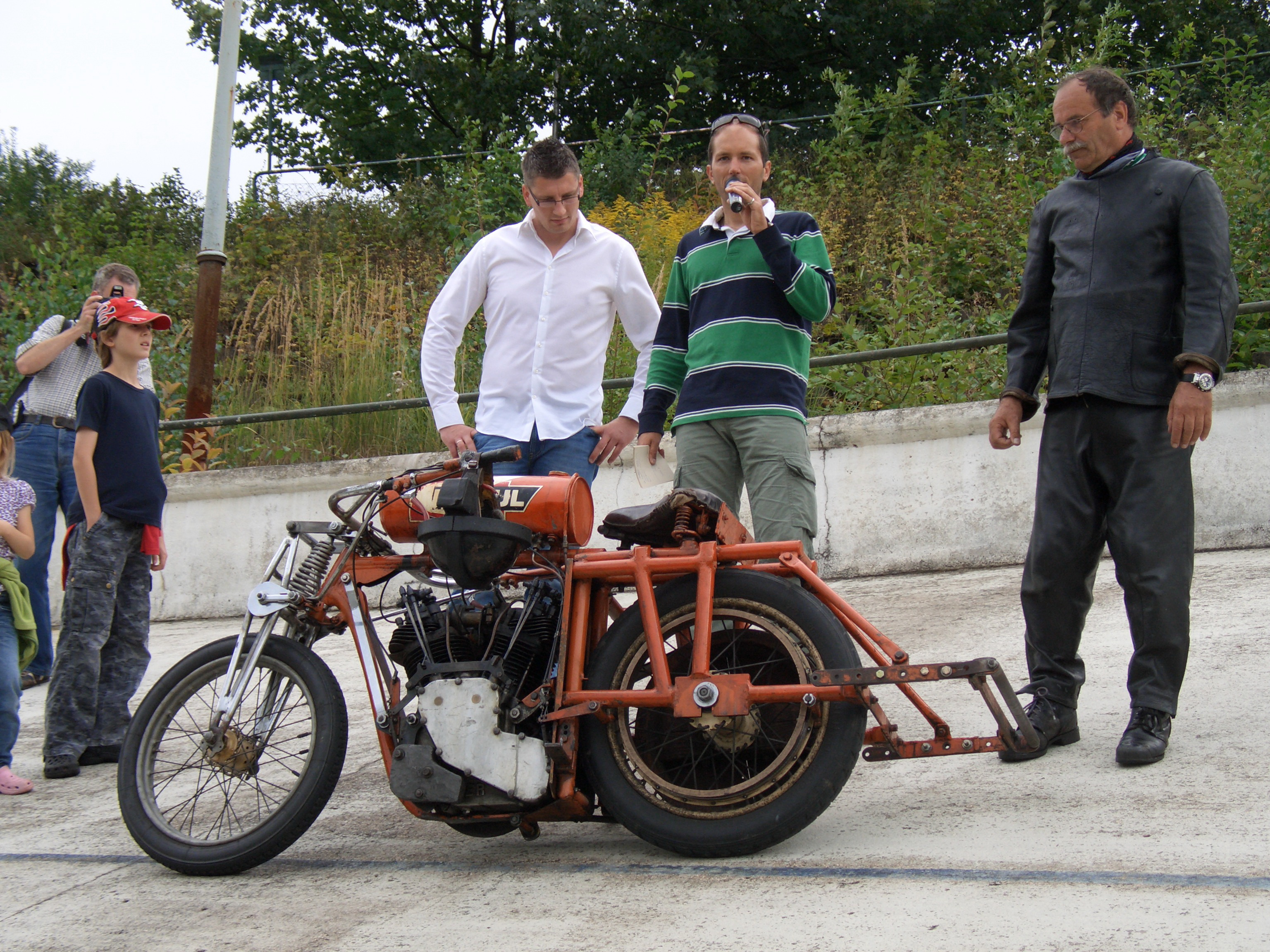 Historische Schrittmachermaschine ("das orange Monster") auf der Radrennbahn Bielefeld, auf dem Foto: Marcel Klöpping (l.), Andreas Hildebrandt (M.), Christian Dippel